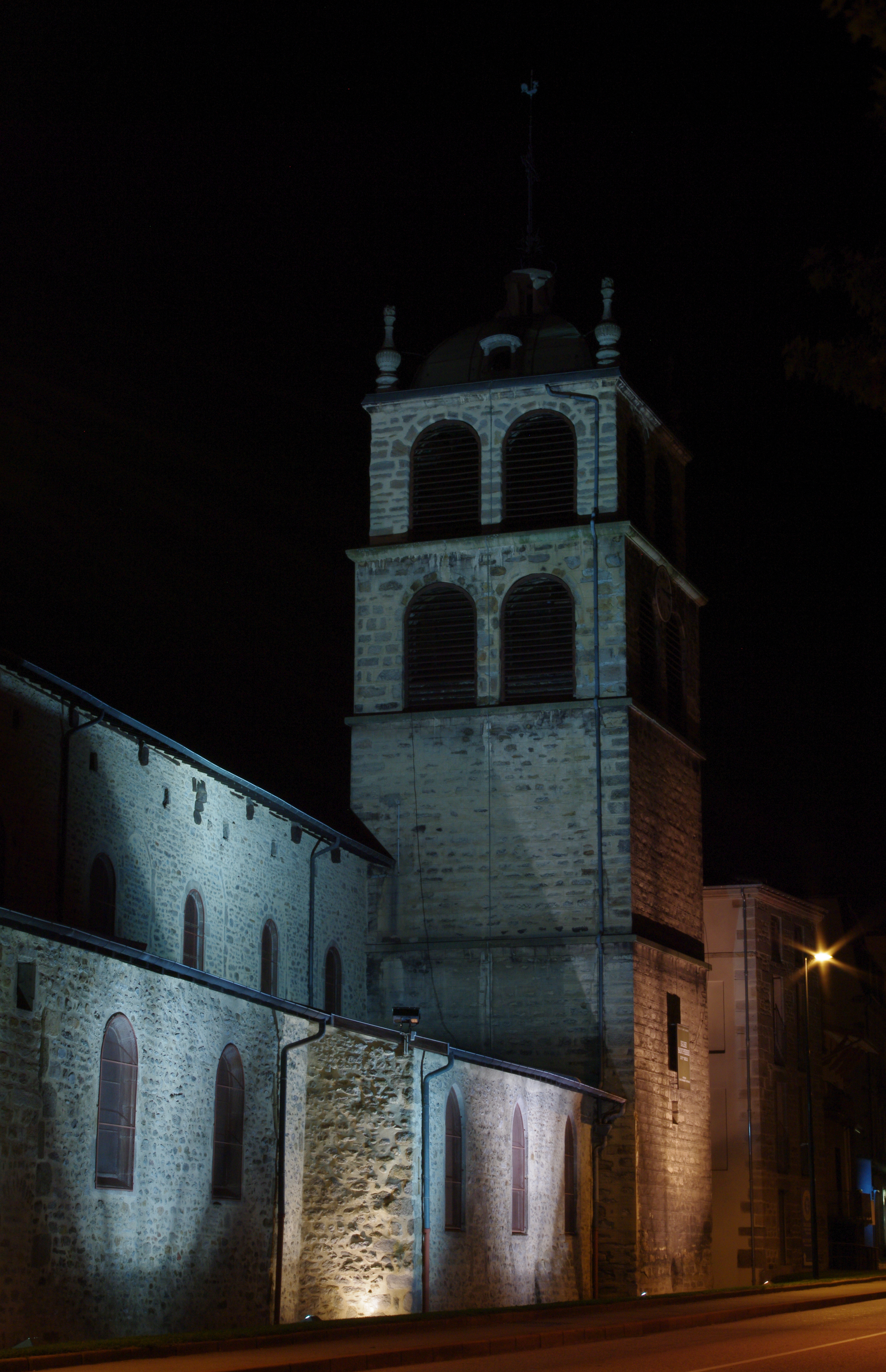 Eglise Saint-Pierre, Saint-Chamond This building is en partie classé, en partie inscrit au titre des Monuments Historiques. .